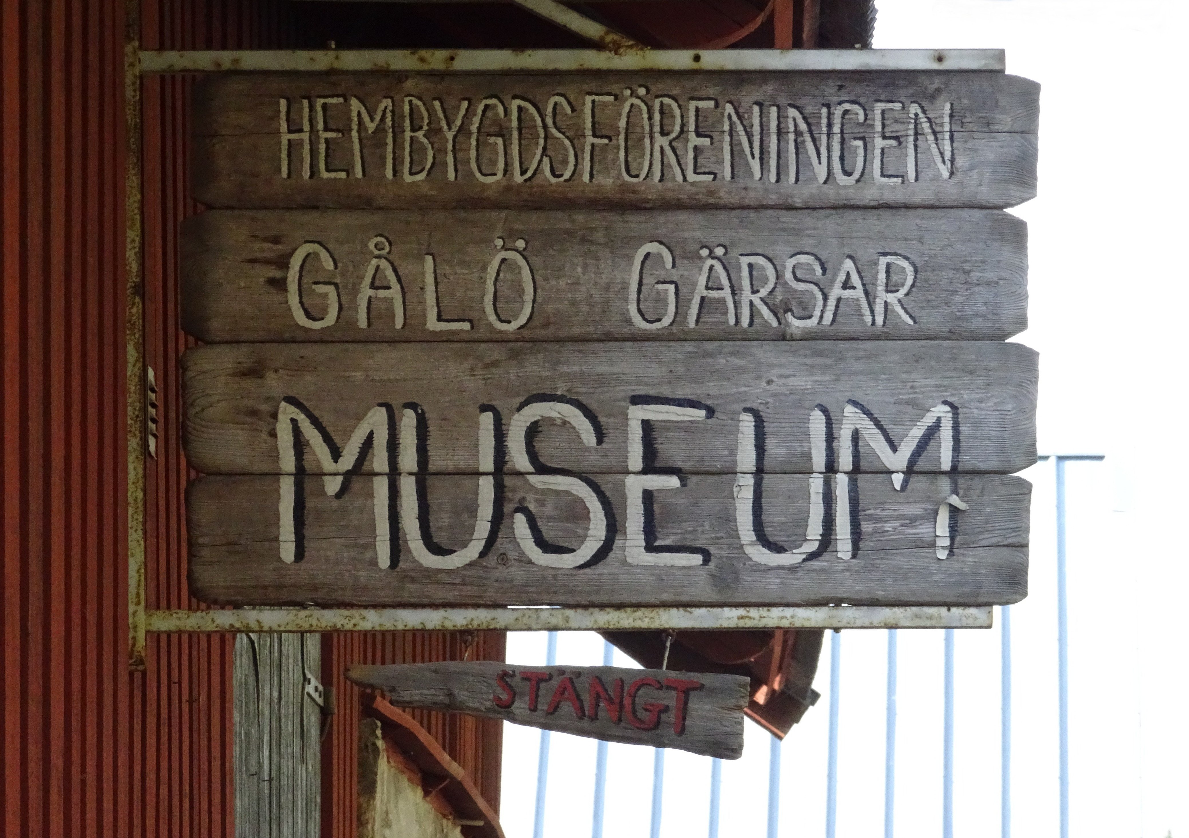 Gålö Gärsar museum på Gålö